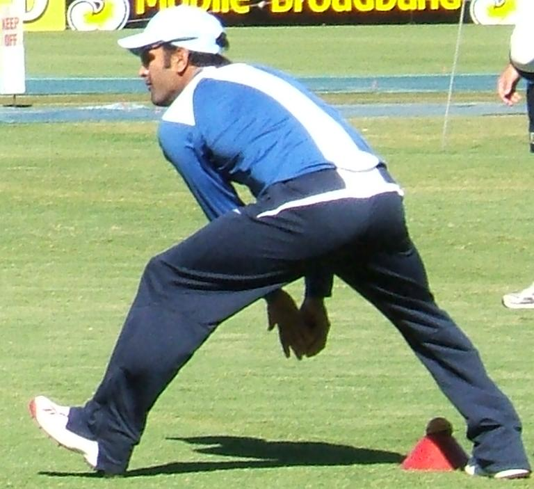 Mahendra Singh Dhoni bowlingat Adelaide Oval